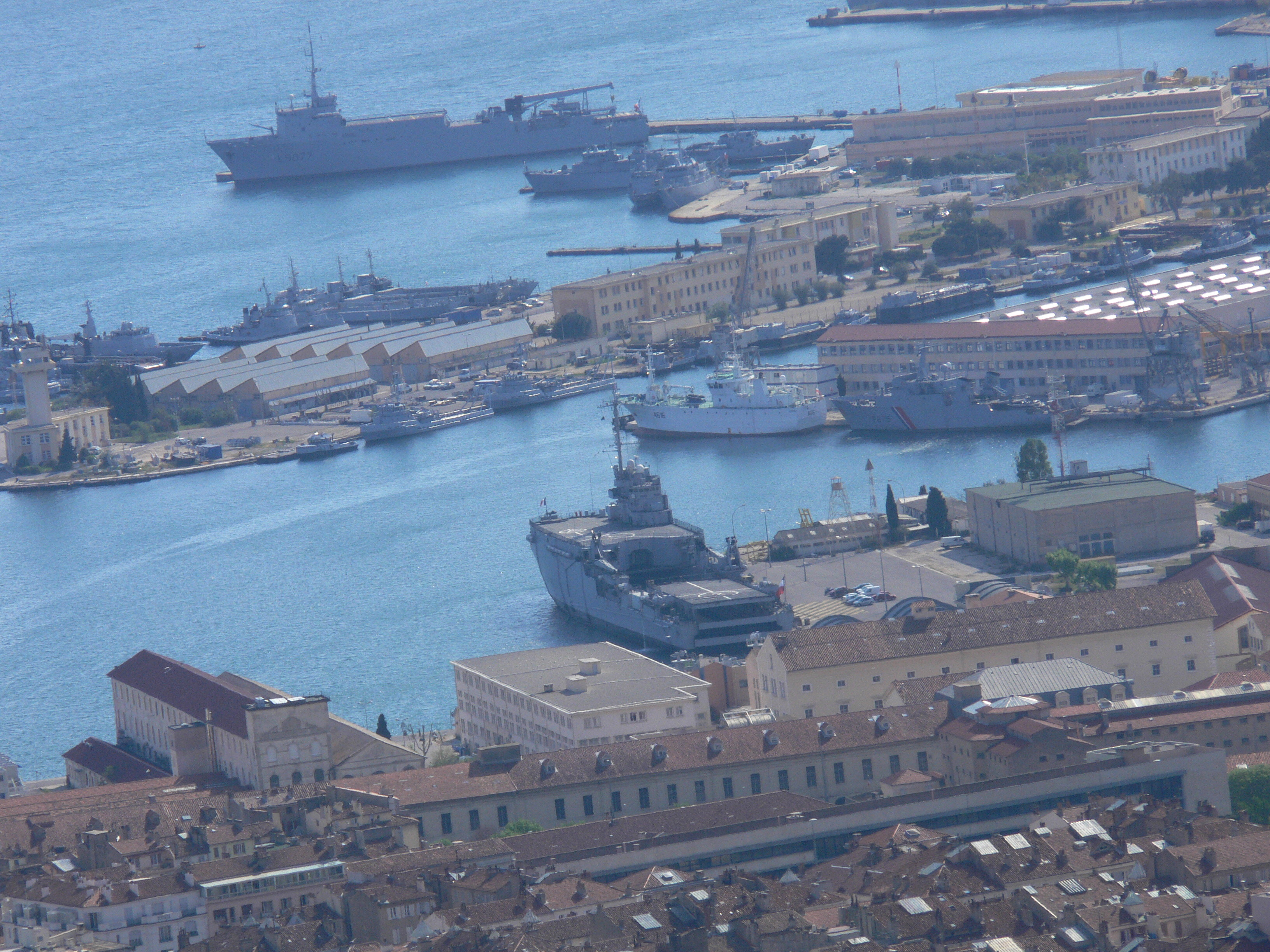 Arsenal de Toulon (Var, France) vu depuis le Mont Faron.